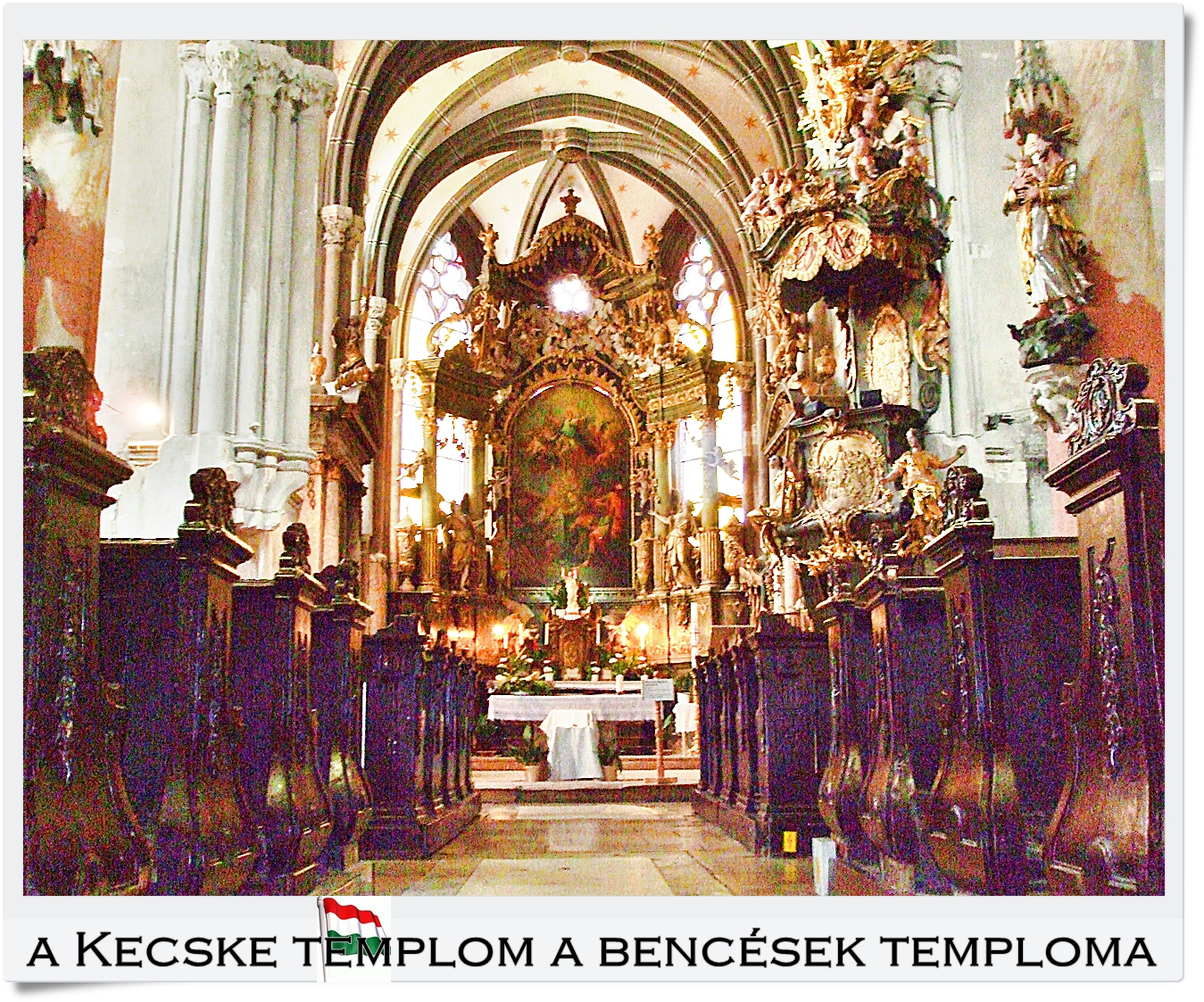 a Kecske templom a bencések temploma